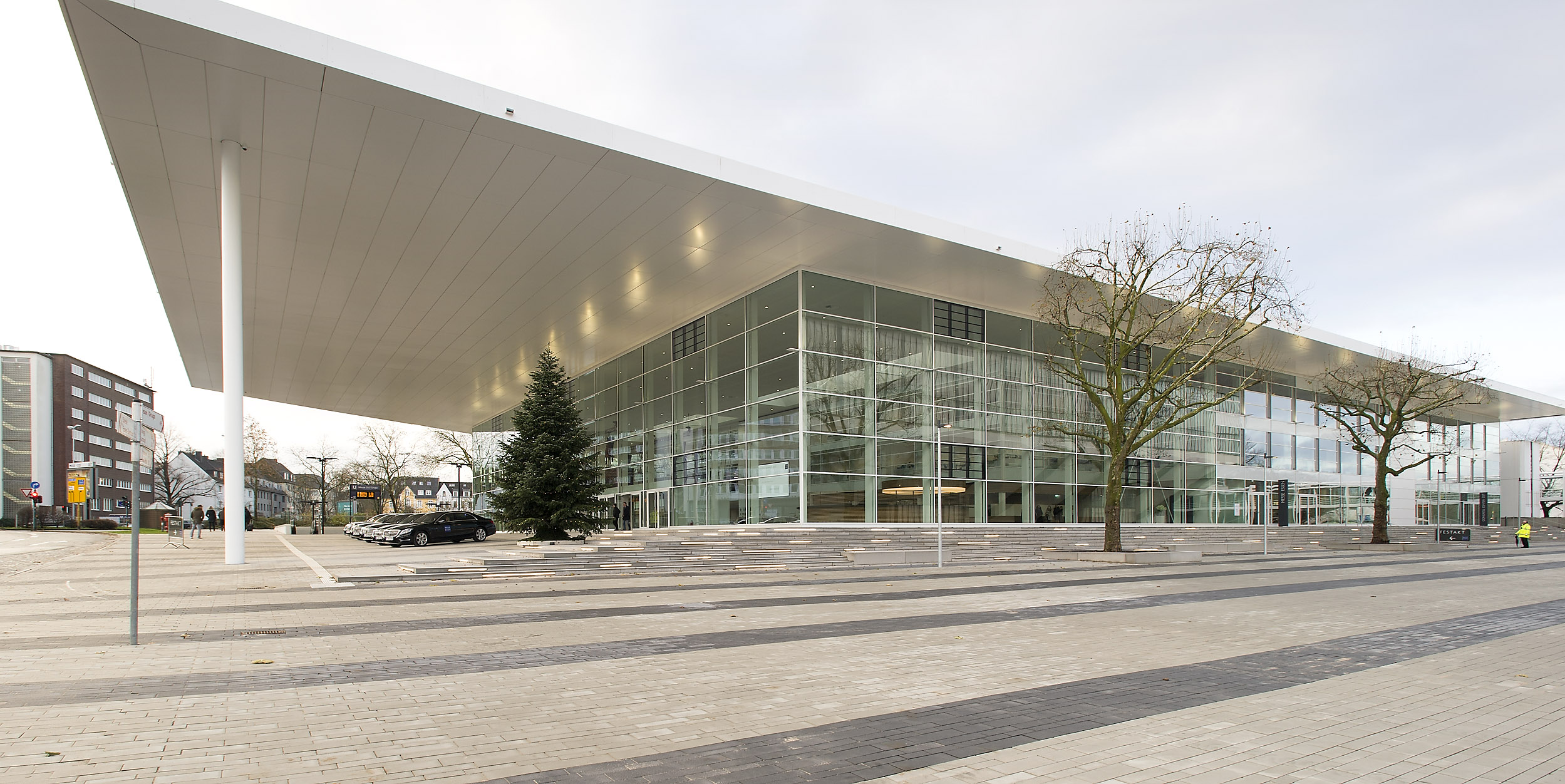 Messe Essen feiert den Abschluss der ersten Bauphase. In der Messe Essen fand ein Festakt mit rund 500 geladenen Gästen aus Politik, Wirtschaft, Medien und der Messebranche statt, um den punktgenauen Abschluss der ersten Phase der Messe-Modernisierung zu feiern. Mit der Eröffnung des neuen, 2.000 Quadratmeter großen Glasfoyers mit direkt anschließenden neuen Kongressräumlichkeiten erreicht das im Mai 2016 gestartete Bauprojekt seinen wichtigsten Meilenstein. Gleichzeitig geht die erste Hälfte der neuen, 11.000 Quadratmeter großen Halle 6 mit direktem Blick in den Grugapark in Betrieb.